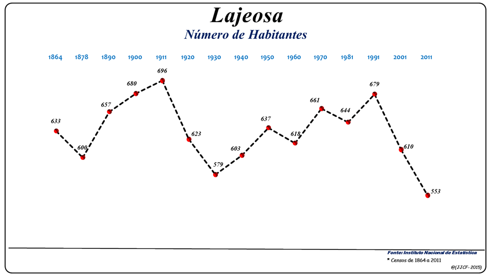 População